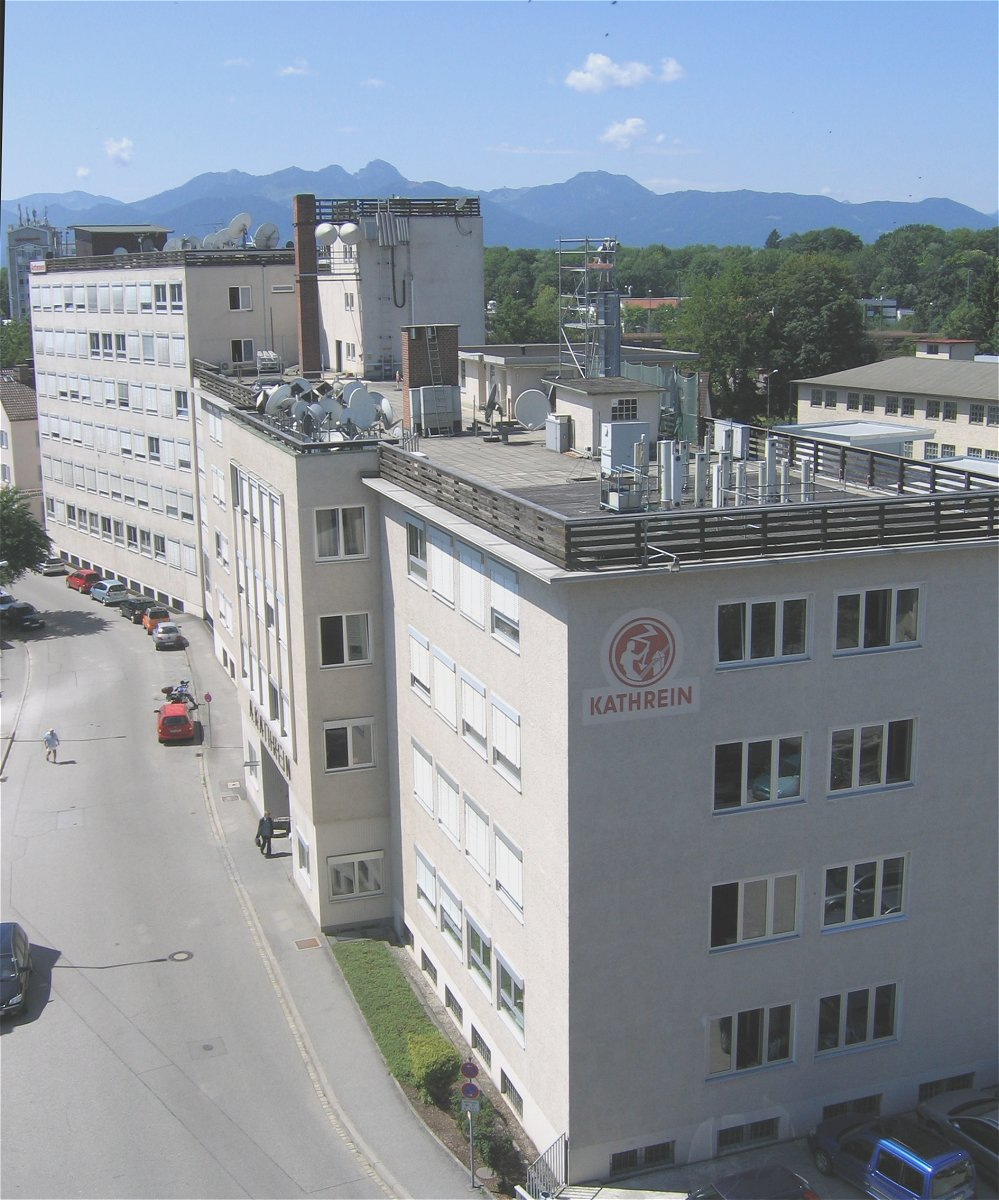 Kathrein-Werke, Rosenheim